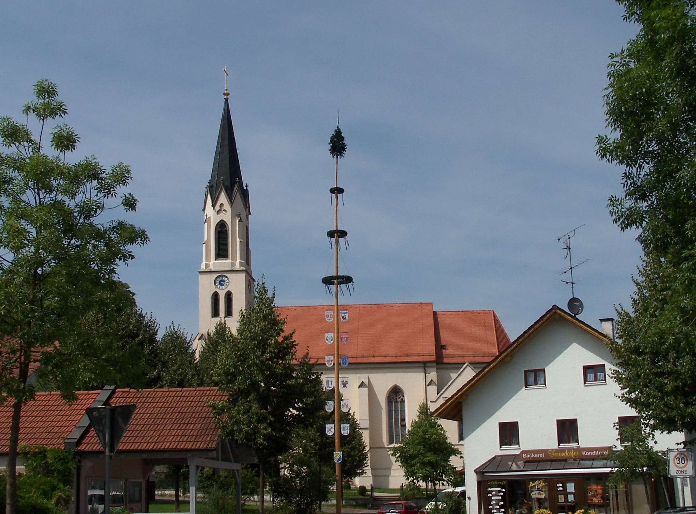 Wörth an der Donau. Hofdorf. Kath. Expositurkirche St. Michael.